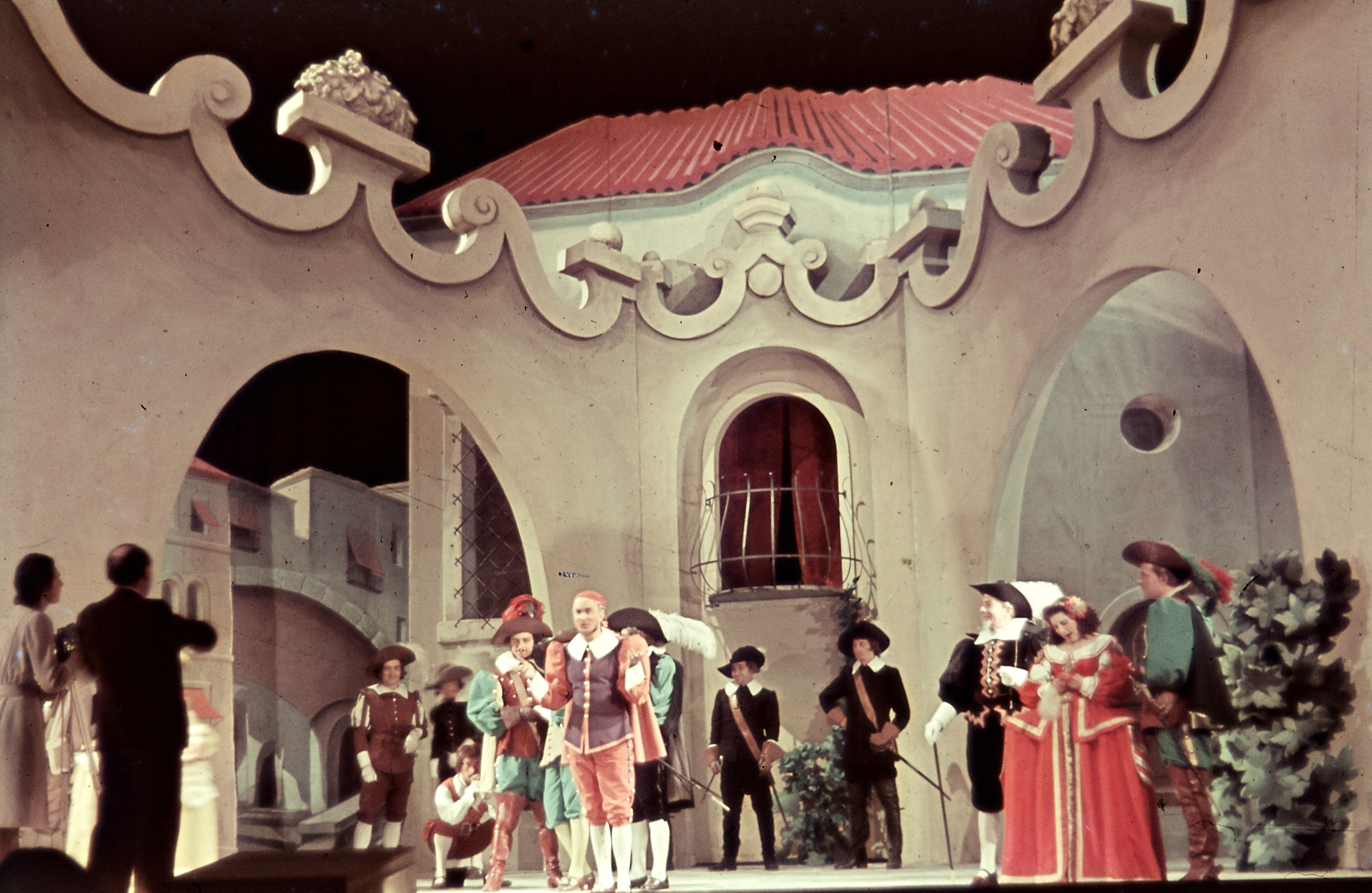 a Nemzeti Színház előadása: A zöld nadrágos lovag. Középen piros nadrágban Uray Tivadar. Location: Hungary, Budapest VIII. Tags: art of theater, colorful, theater, Budapest Title: a Nemzeti Színház előadása: A zöld nadrágos lovag. Középen piros nadrágban Uray Tivadar.